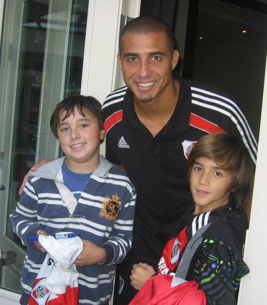 Aca tomy,fanatico de River Plate,con su idolo David Sergio Trezeguet y su amigo Leandro.